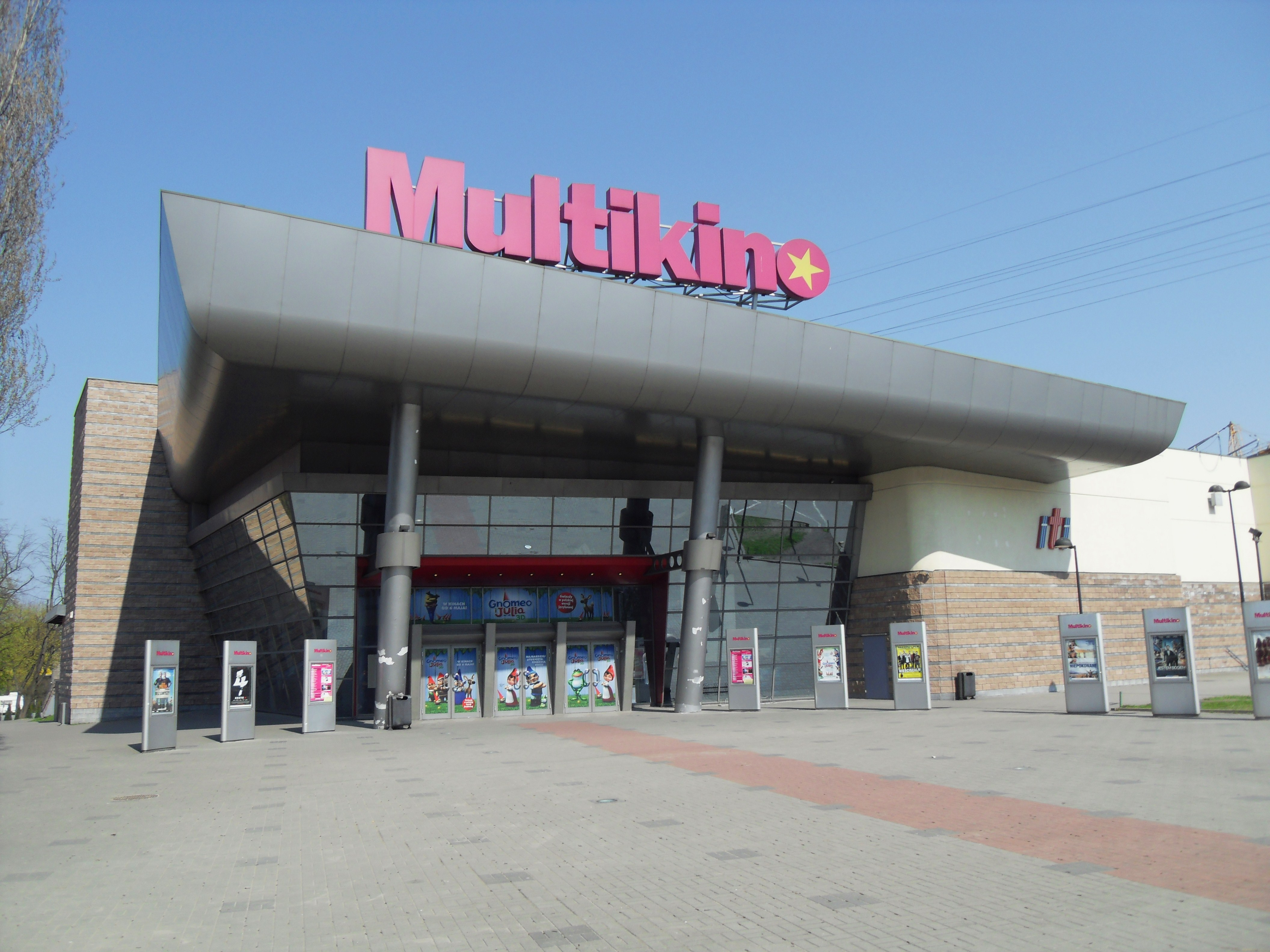 Gdańsk Aniołki. Multikino, al. Zwycięstwa 14.